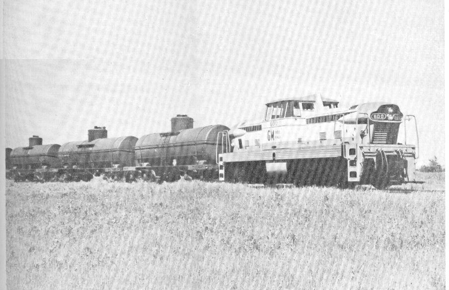 Locomotiva GMDH-1 General Motors Diesel Hidráulica nº 600 EF Sorocabana